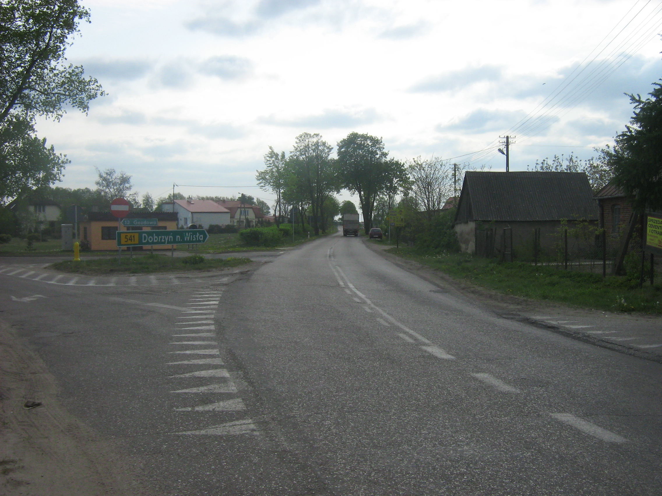 Droga wojewódzka nr 541 w Piaskach koło Sierpca.